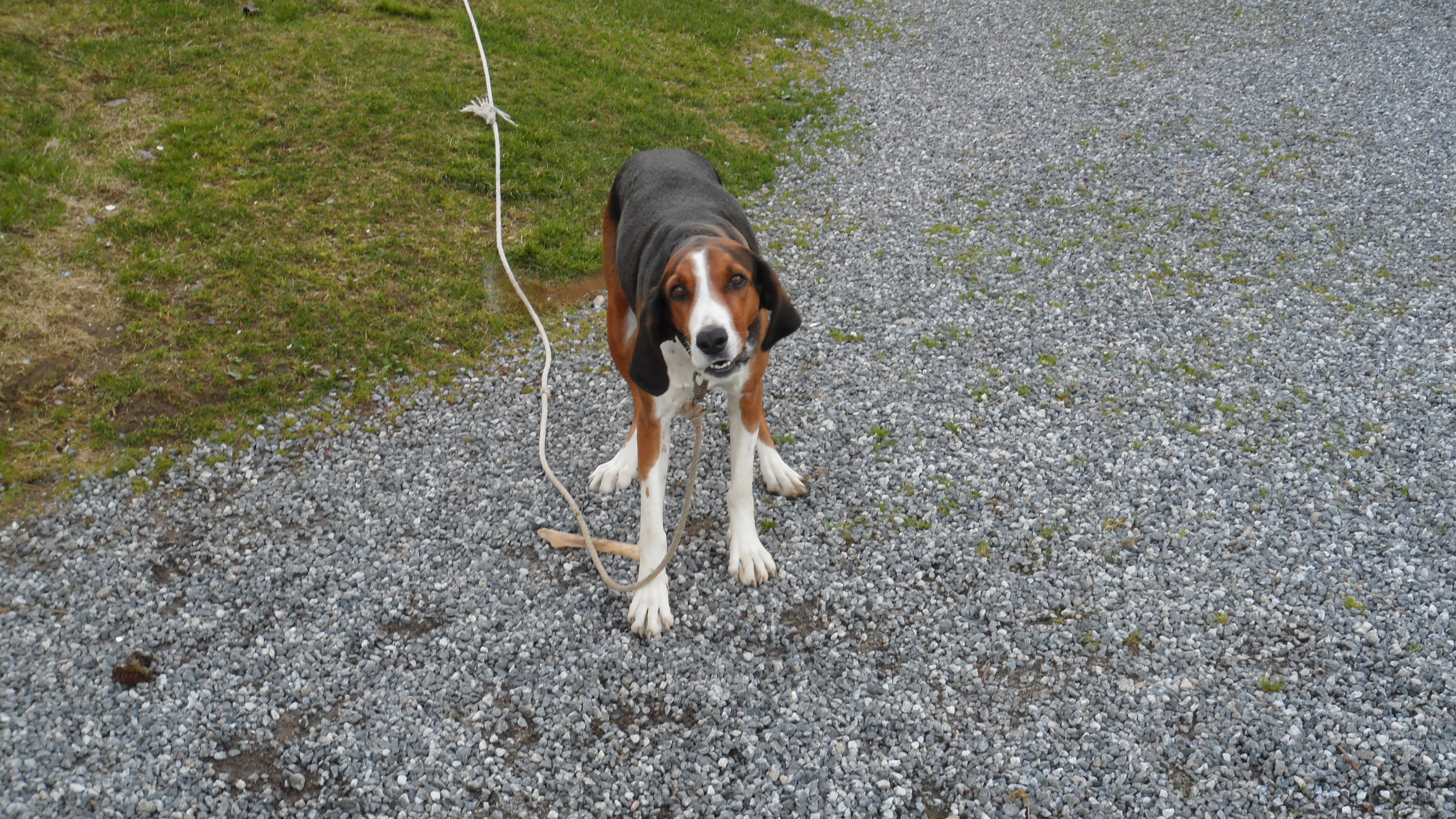 NM vinner